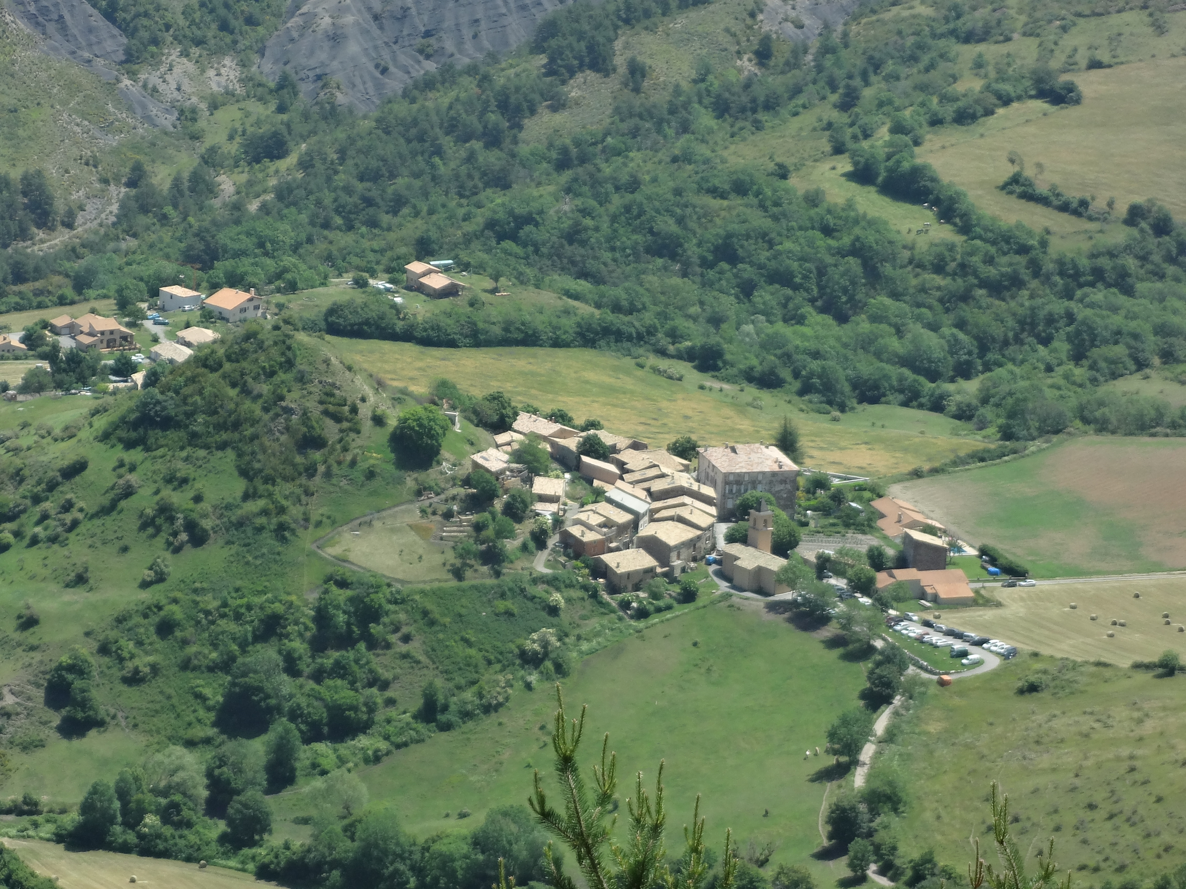 Village d'Entrages, vue de la montagne du Cousson (descente)